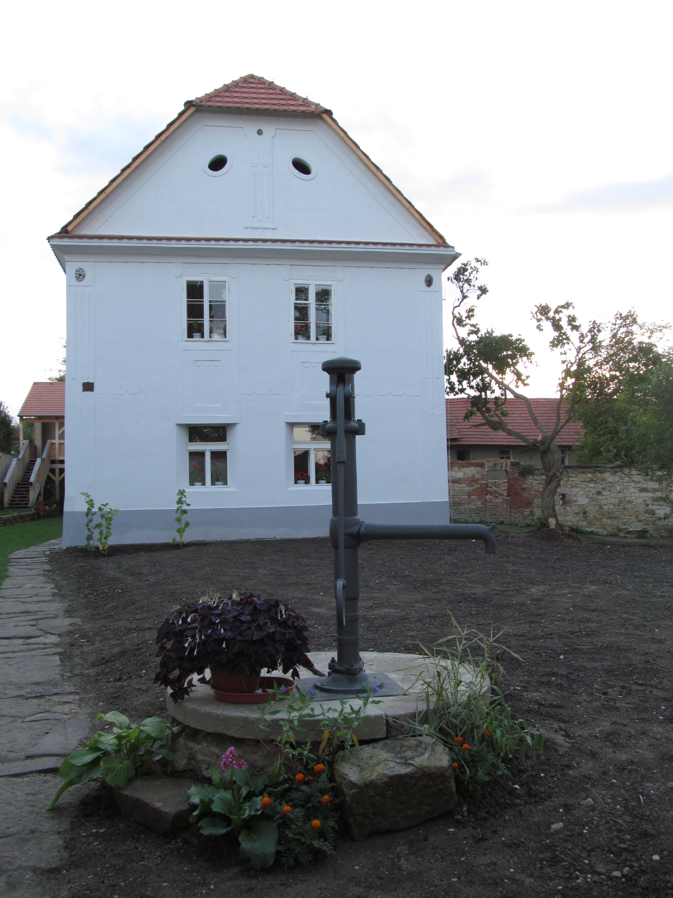 Venkovský dům (Ledčice), Ledčice 15